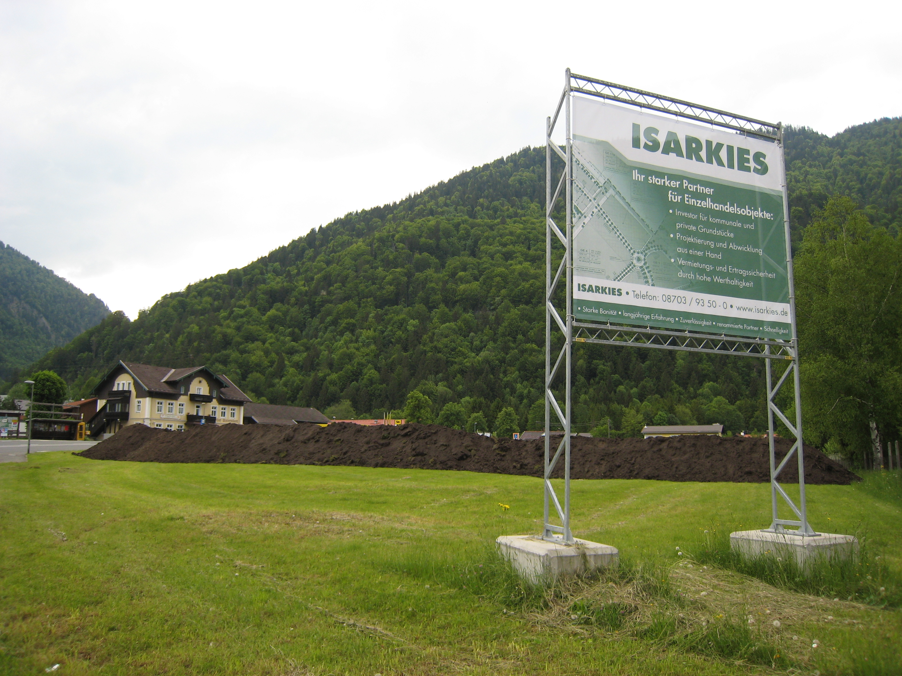 Gemeinde Oberau in Bayern, im Bereich des neuen Gewerbegebietes „Untermberg“. Erdarbeiten für u. a. den Bau eines Supermarktes auf einem Grundstück, das zuvor im baurechtlichen Außenbereich der Gemeinde lag und landwirtschaftlich genutzt wurde (als Weideland).